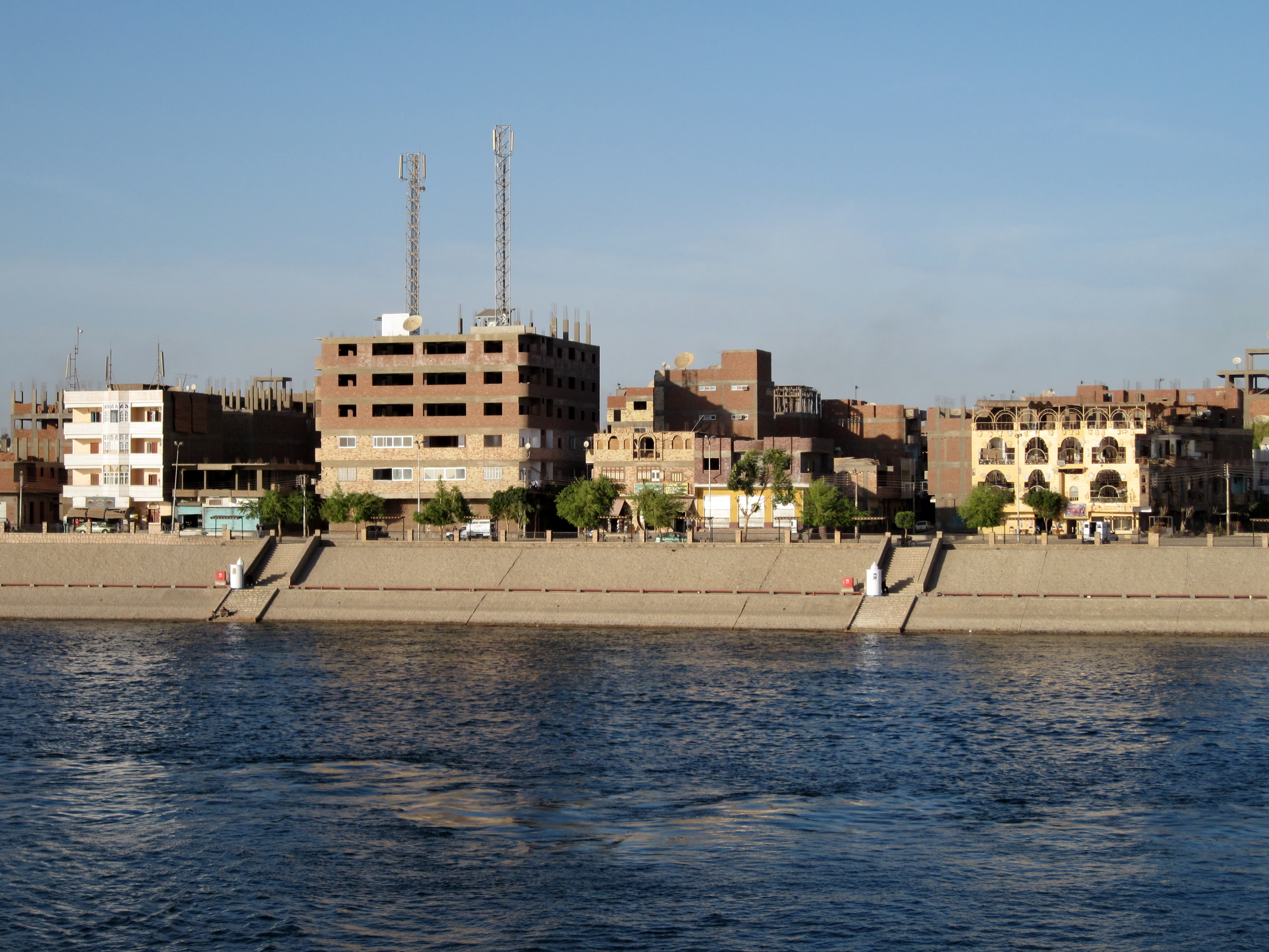 Uferseite von Kom Ombo, Ägypten